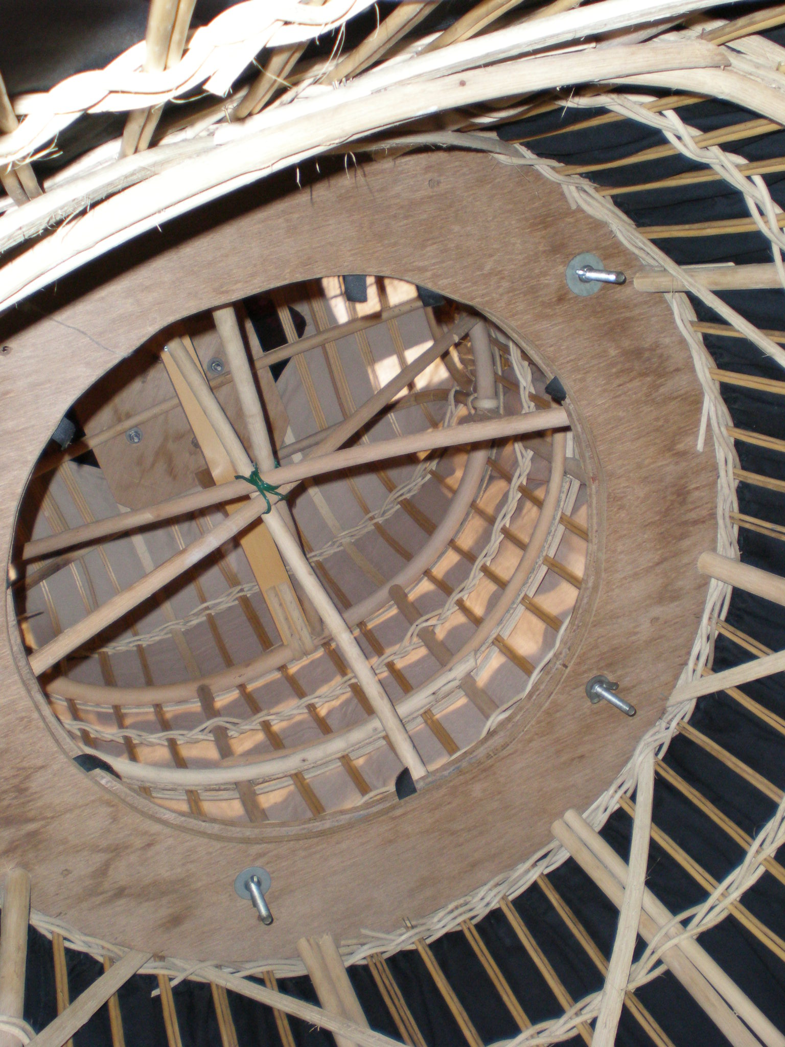 Intérieur d'un géant de cortège